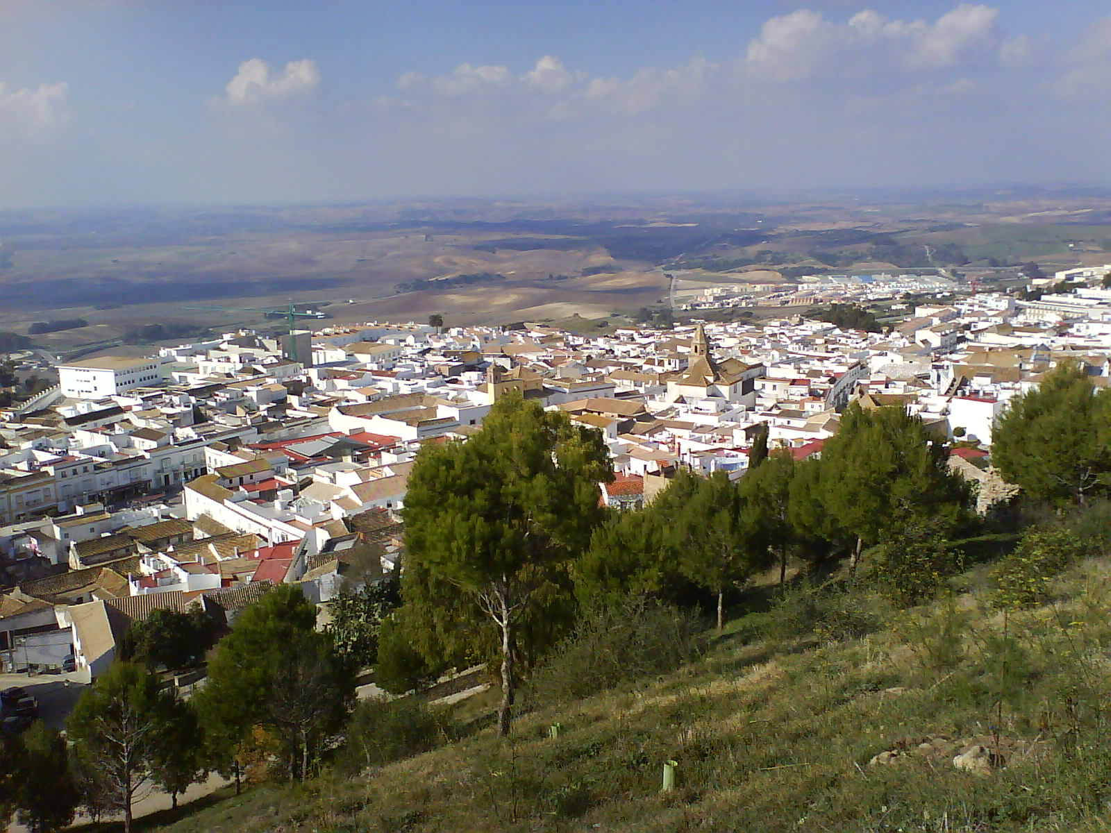 Vistas de Medina-Sidonia desde lo alto del cerro del Castillo.